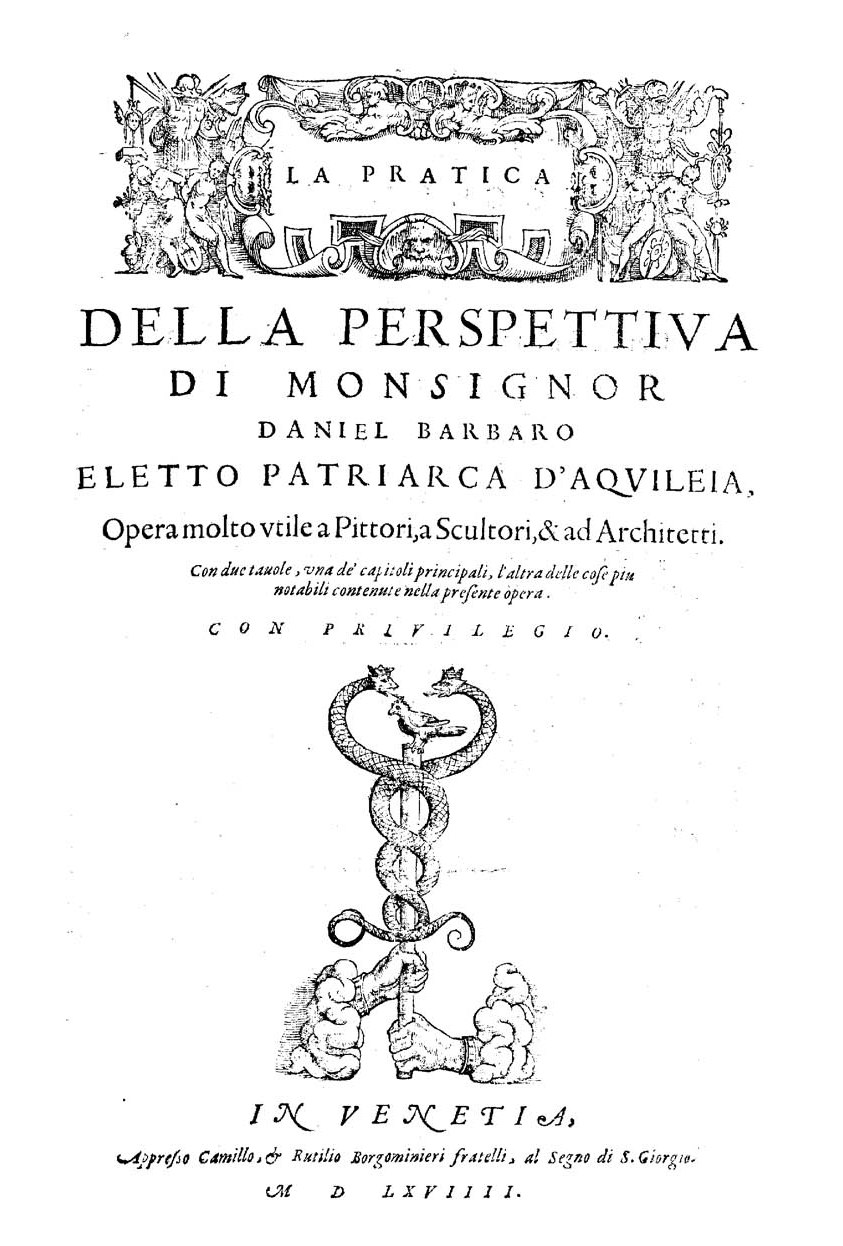 La pratica della perspettiva di Monsignor Daniel Barbaro eletto Patriarca d'Aqvileia, opera molto vtile a pittori, a scultori, & ad architetti. Con due tavole .... - In Venetia : appresso Camillo, & Rutilio Borgominieri fratelli, al Segno di S. Giorgio, 1569 (In Venetia : appresso Camillo & Rutilio Borgominieri fratelli, al segno di S. Giorgio, 1569). - 195, [13] p. : ill. ; 2° .